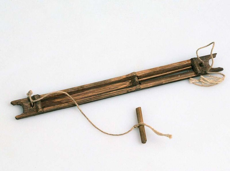 Tokkelinstrument. Mondharp van palmhout Unknown language: Oli-oli